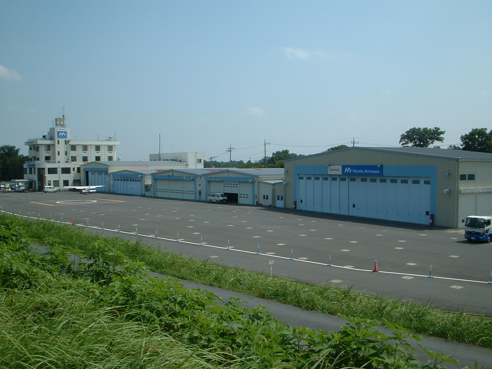 本田航空の建物